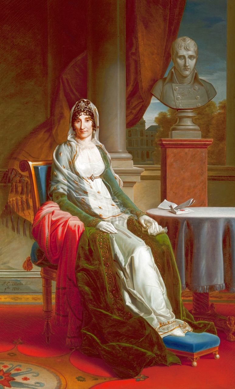 Pierre-Edmond Martin (Français, 1783-?) d'après l'original (1802-1804) de François Gérard: Portrait de Maria Letizia Ramolino dite madame Mère, huile sur toile signée et datée "Pierre-Edmond Martin, septembre 1810"[1], seconde antichambre de l'appartement de Joachim Murat, roi de Naples (Gioacchino I) de 1808 à 1815), Palais de Caserte, Italie.